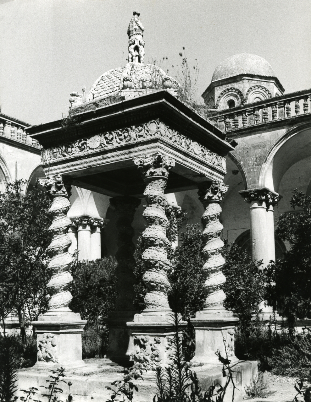 Serie fotografica : Lecce, 1970 / Paolo Monti. - Stampe: 2 : Positivo b/n, gelatina bromuro d'argento/ carta, 24x30. - ((Al verso delle stampe manoscritto: "1241/18 Lecce/ S. Nicola e Cataldo", e "Fulciniano 1242/14". Sul coperchio della scatola manoscritto: "Puglie/ Architettura". - Fonte: Agenda di Paolo Monti: Foto Leica 2 / 111 - 285 (1934-1965), presso Archivio Paolo Monti. - Fonte: Agenda di Paolo Monti: Monti - Agenda 1970 (1970)